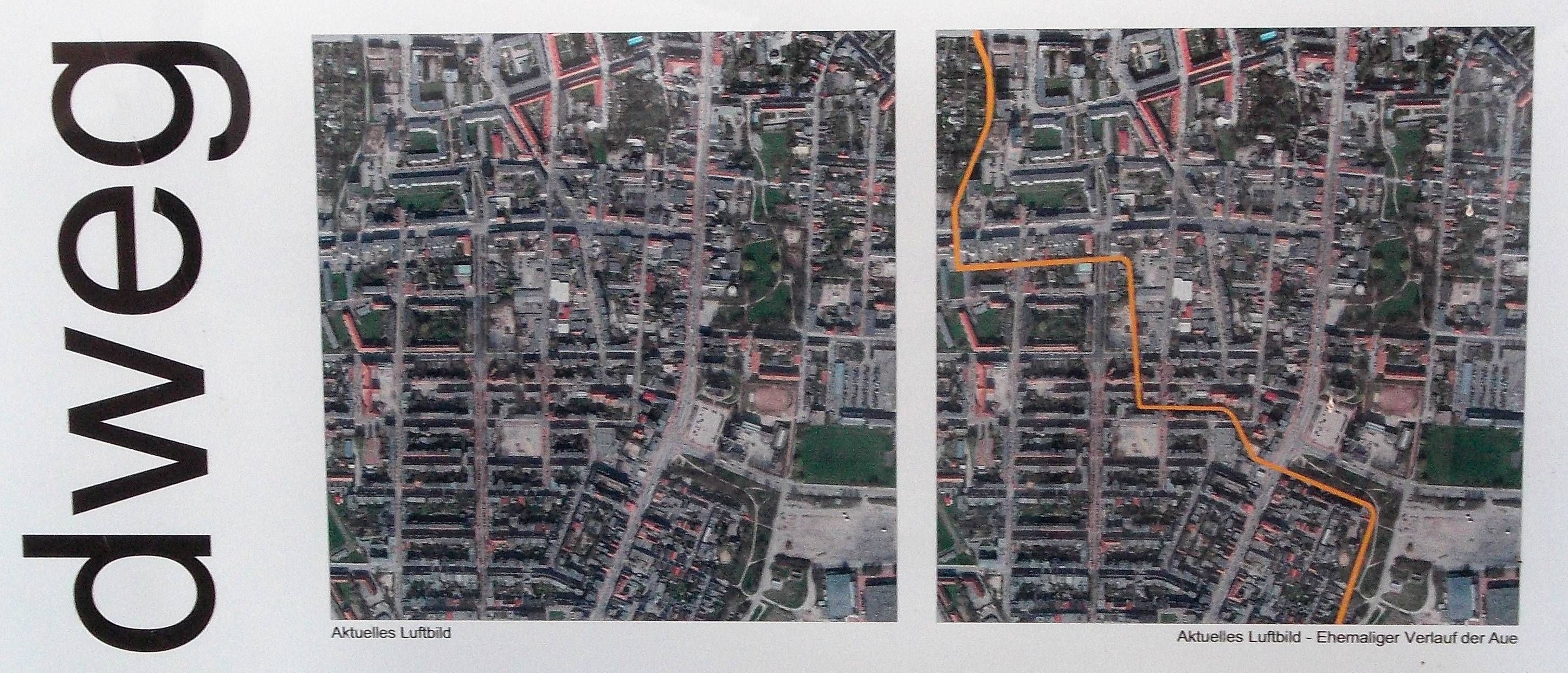 Infotafel am Altstadtrundweg Lehe in Bremerhaven, die den Verlauf der zugeschütteten Aue im Goethe-Quartier zeigt.